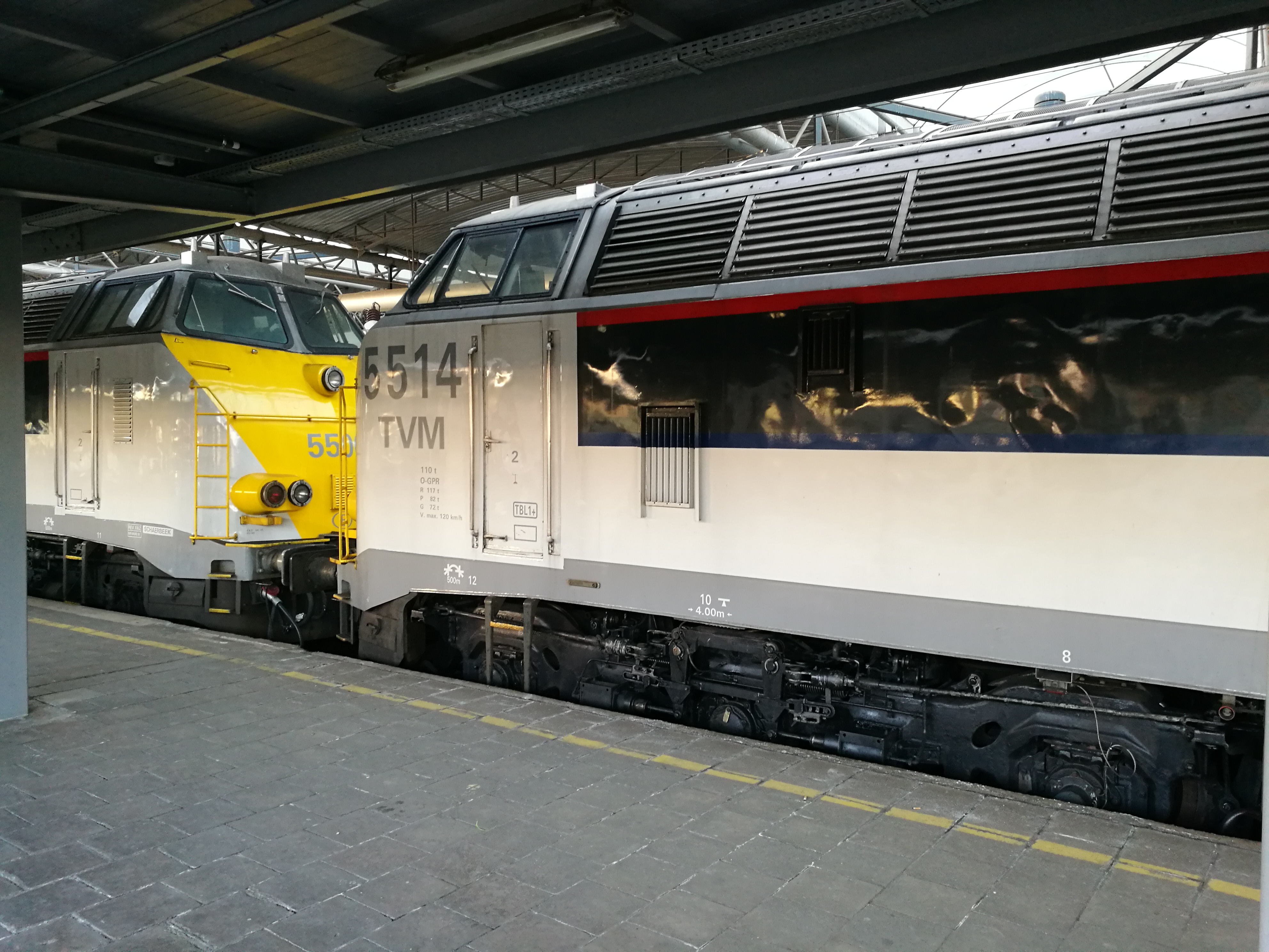 NMBS HLD 55 in new look livery te Brussel Zuid (24-03-2018)